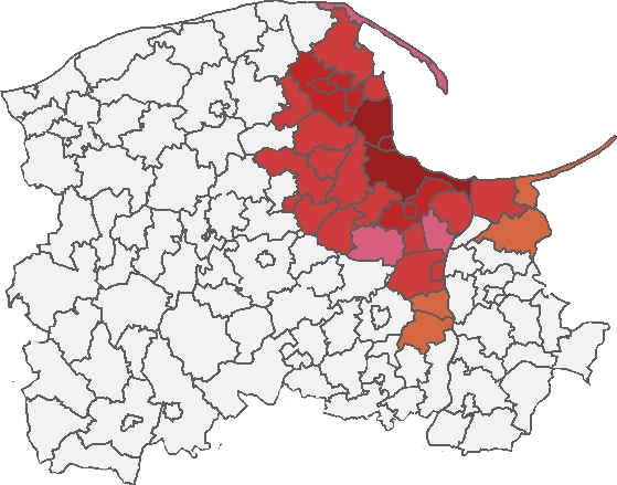 Mapa gmin agl. Trój. na podstawie różnych koncepcji